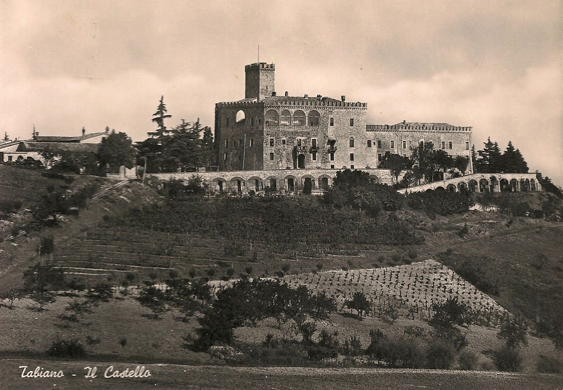 Castello di Tabiano lato sud